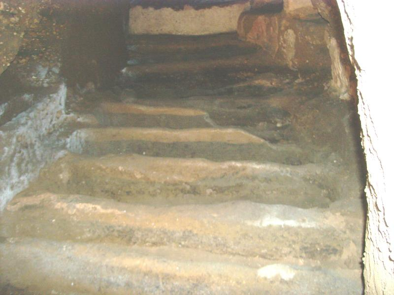 Catacombe ebraiche di Venosa